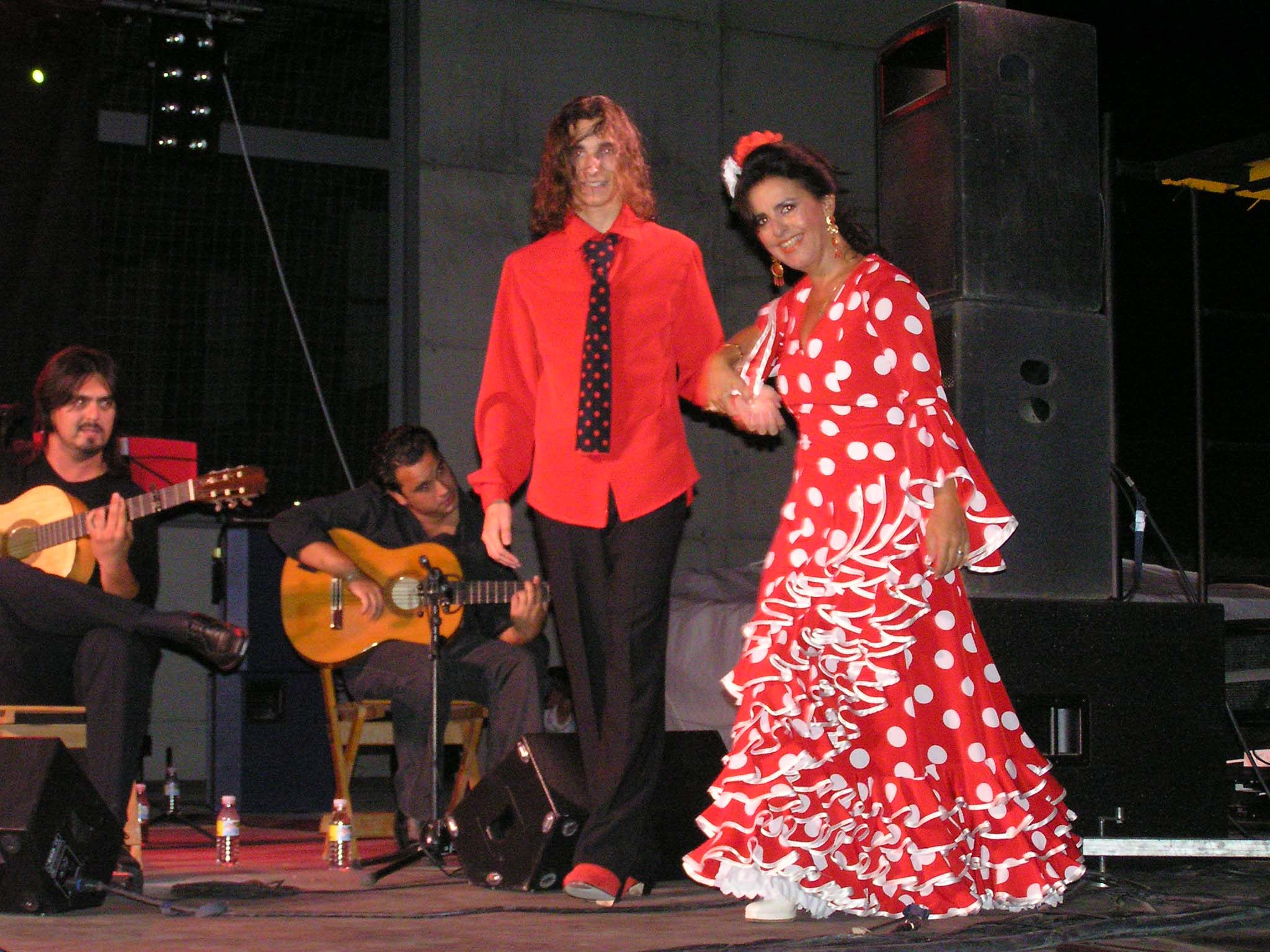 Bailadora flamenca